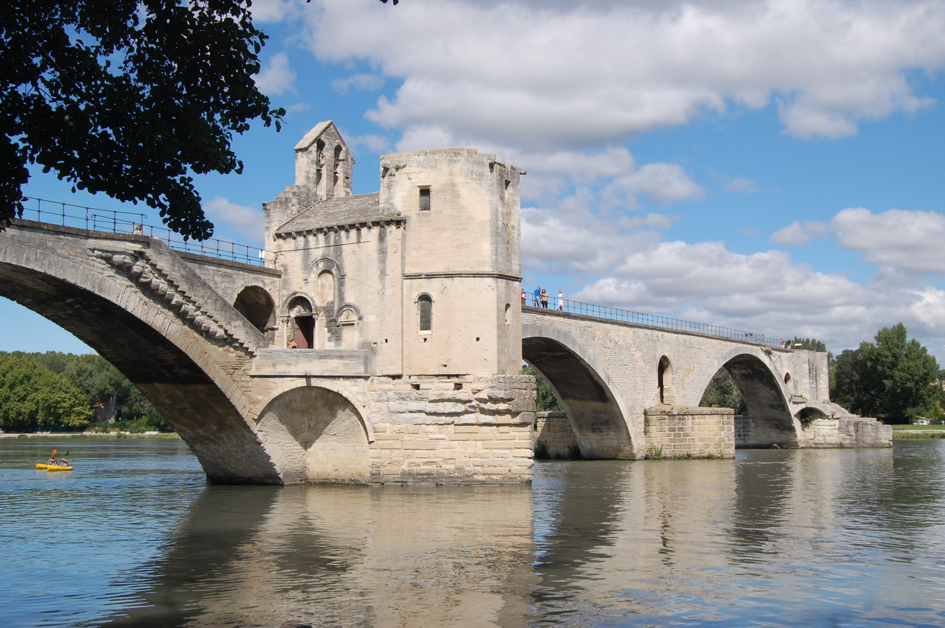 Pont Saint-Bénezet - summer 2011